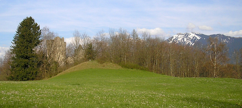 Burg Laubenbergerstein bei Immenstadt im Allgäu (Landkreis Oberallgäu). Die Burg von Westen mit dem Grünten (rechts). Eigene Aufnahme, April 2008 / Laubenbergerstein castle near Immenstadt (Landkreis Oberallgäu, Bavaria, Germany). The caste from the west with Mount Gruenten (right). Own photo, April 2008